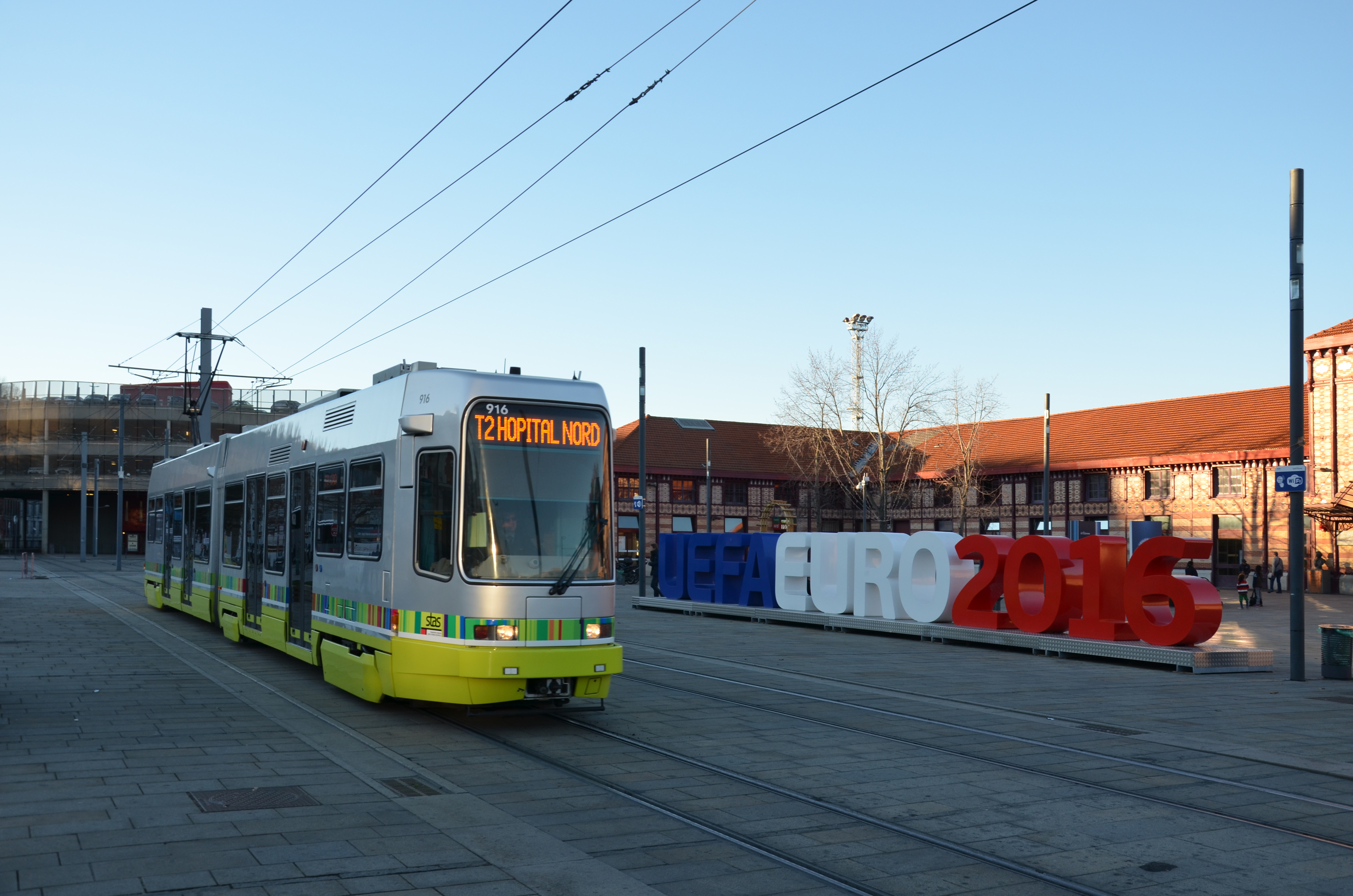 Rame 916 du tramway de Saint-Étienne (réseau STAS), se mettant en place à son quai de départ de Châteaucreux.